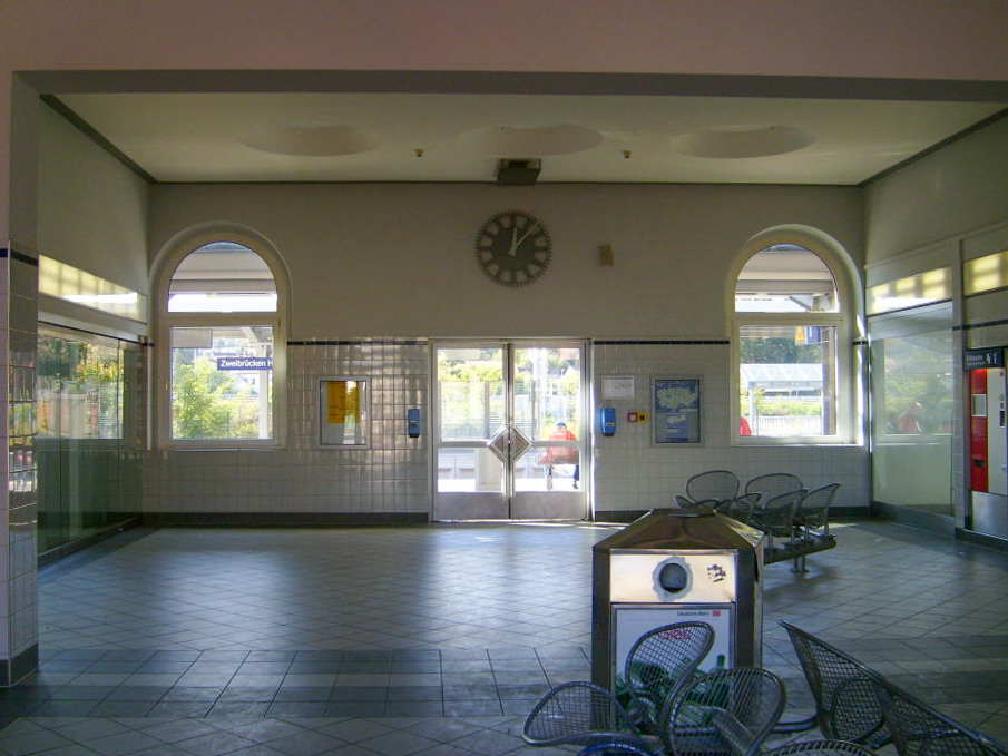 Bahnhofshalle in Zweibrücken, Rheinland-Pfalz, Deutschland.